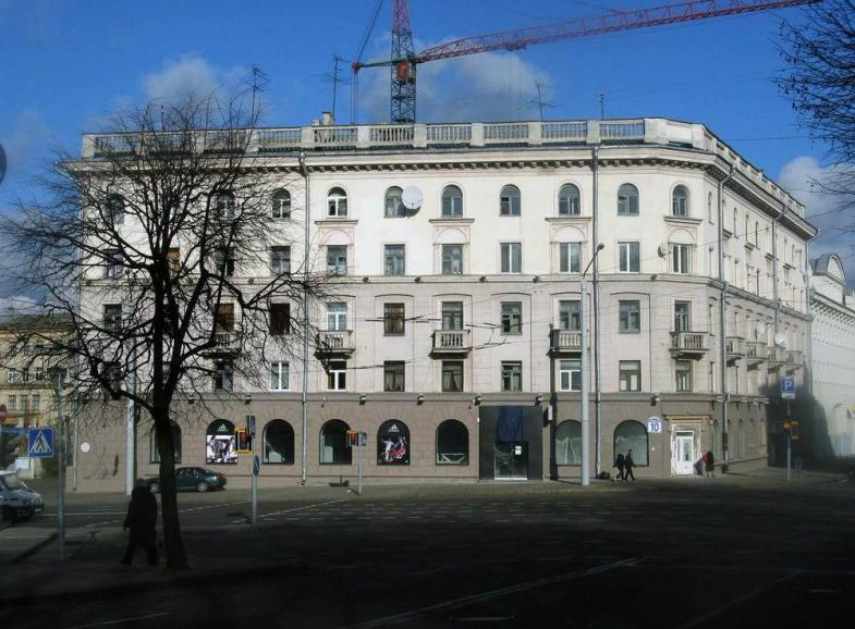 Интернациональная 1